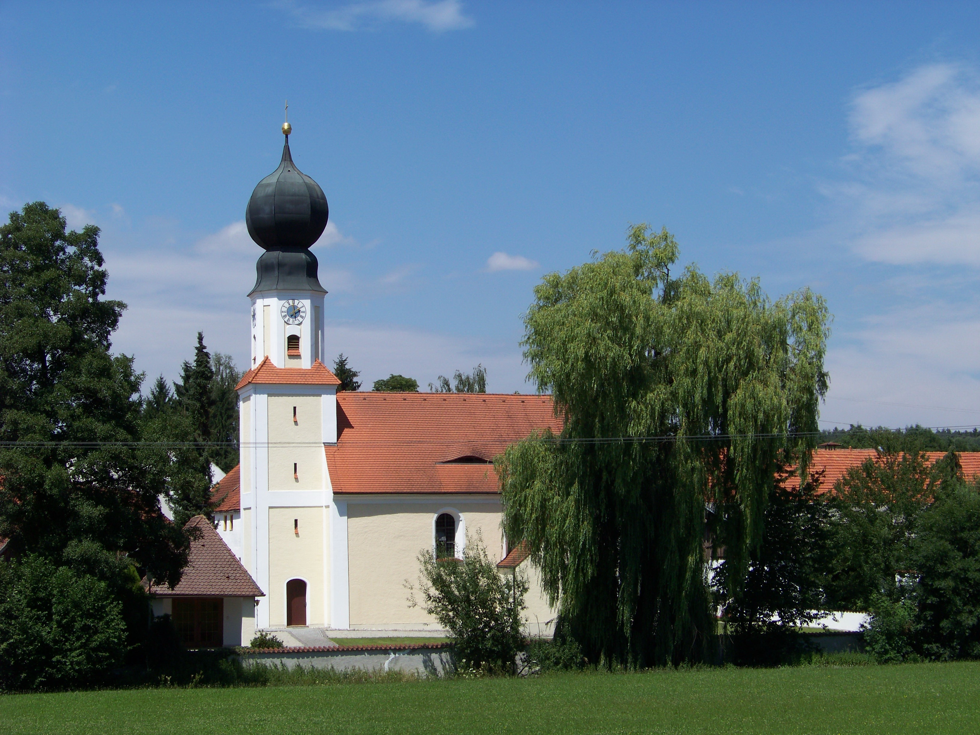 Hohenthann, Oberergoldsbach. Kirche St. Margaretha. Spätromanischer Bau des 13. Jahrhunderts, Ausbau in der 1. Hälfte des 18. Jahrhundert; mit Ausstattung.